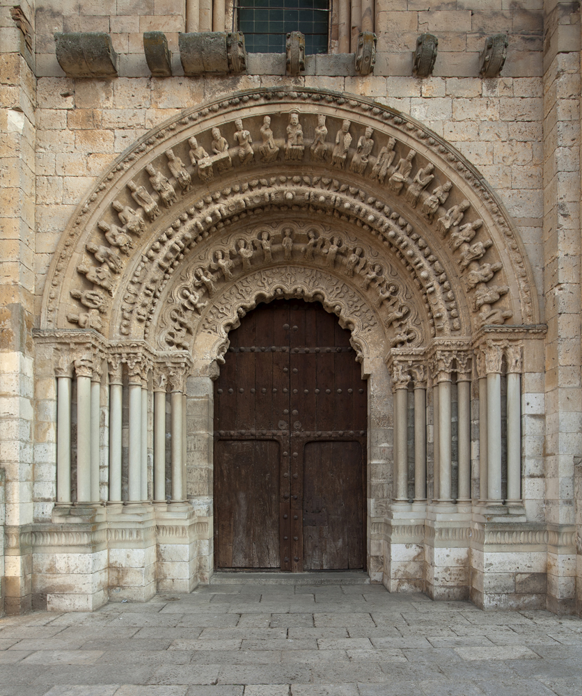 Cultural Heritage Spain